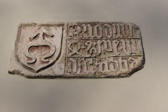 Jędrzejów - tablica fundacyjna opata jędrzejowskiego Mikołaja z Rembieszyc wmurowana w południową ścianę kościoła Św. Trójcy.